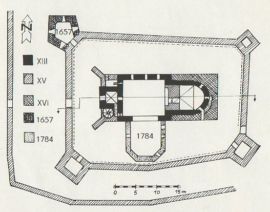 Planul fortificatiei din Homorod.